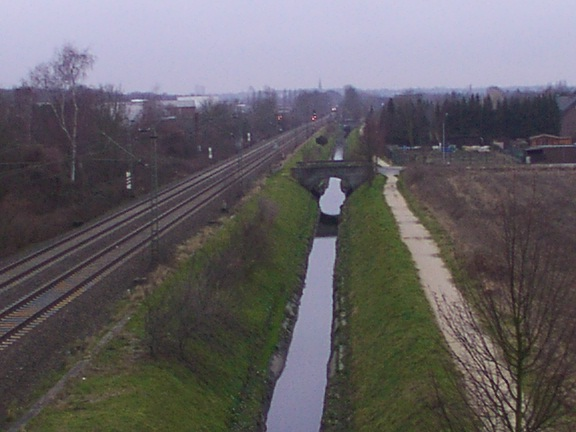 Der Gladbach